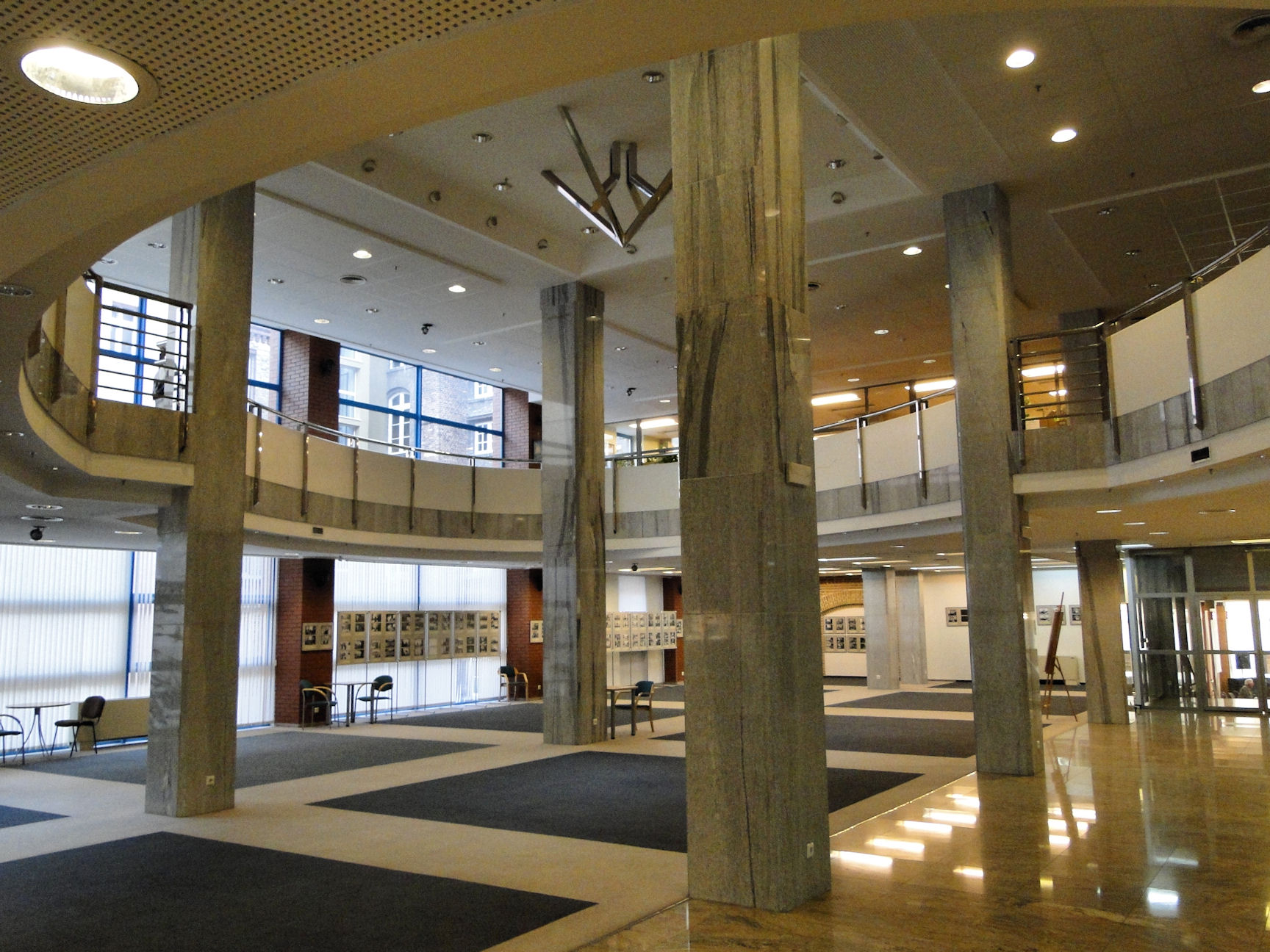 Wnętrze Książnicy Pomorskiej w Szczecinie